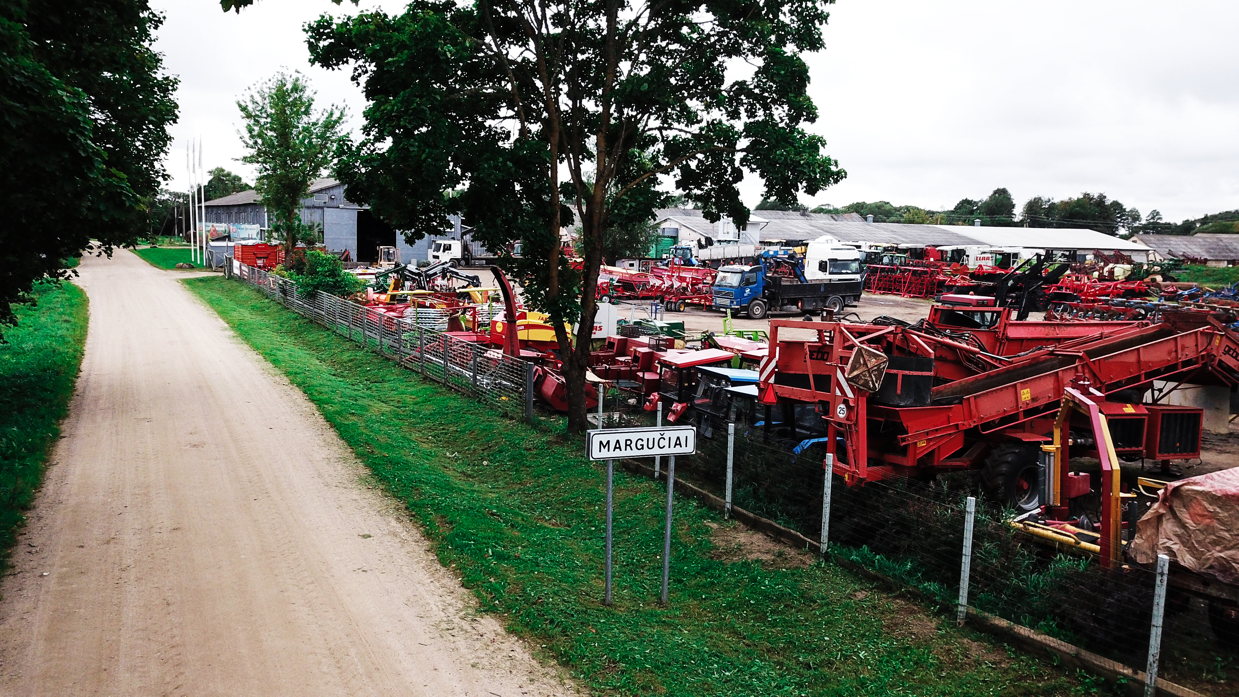 Margučių miestelis įvažiuojant